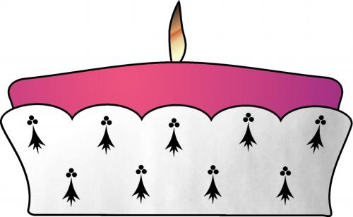 Kurfürstenhut